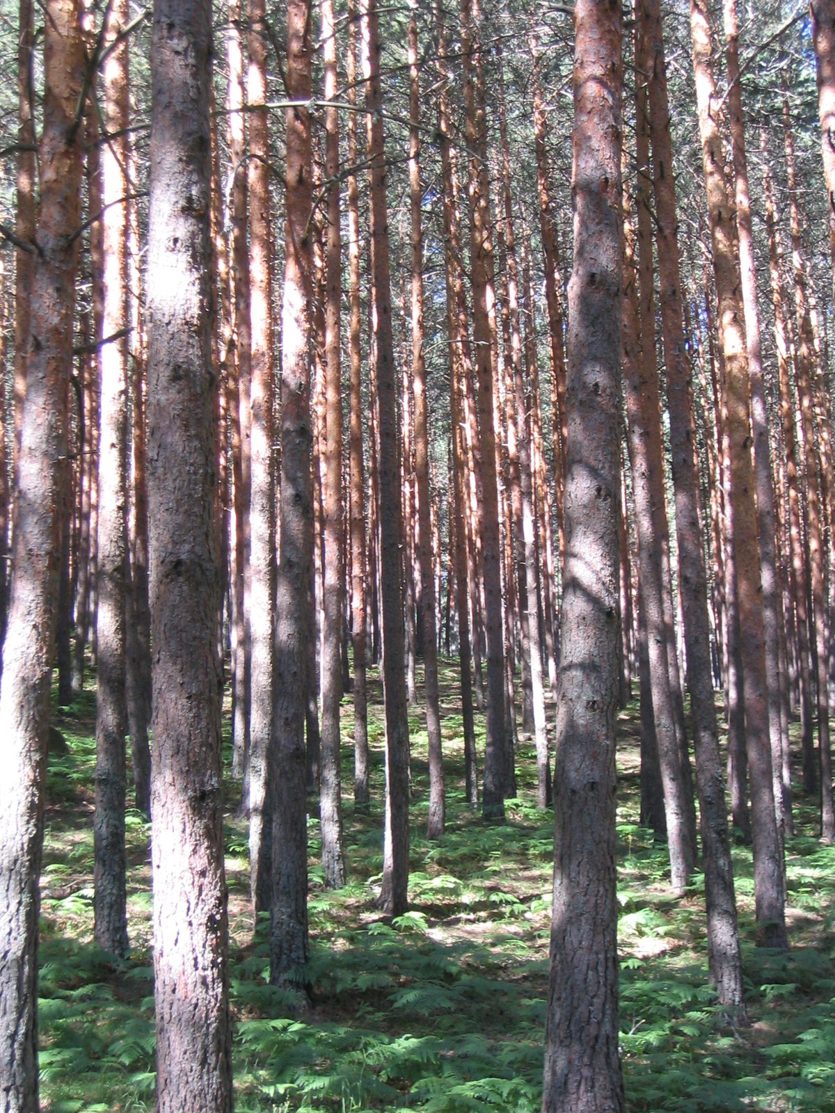 Pinar en el valle de Valsaín, Segovia España